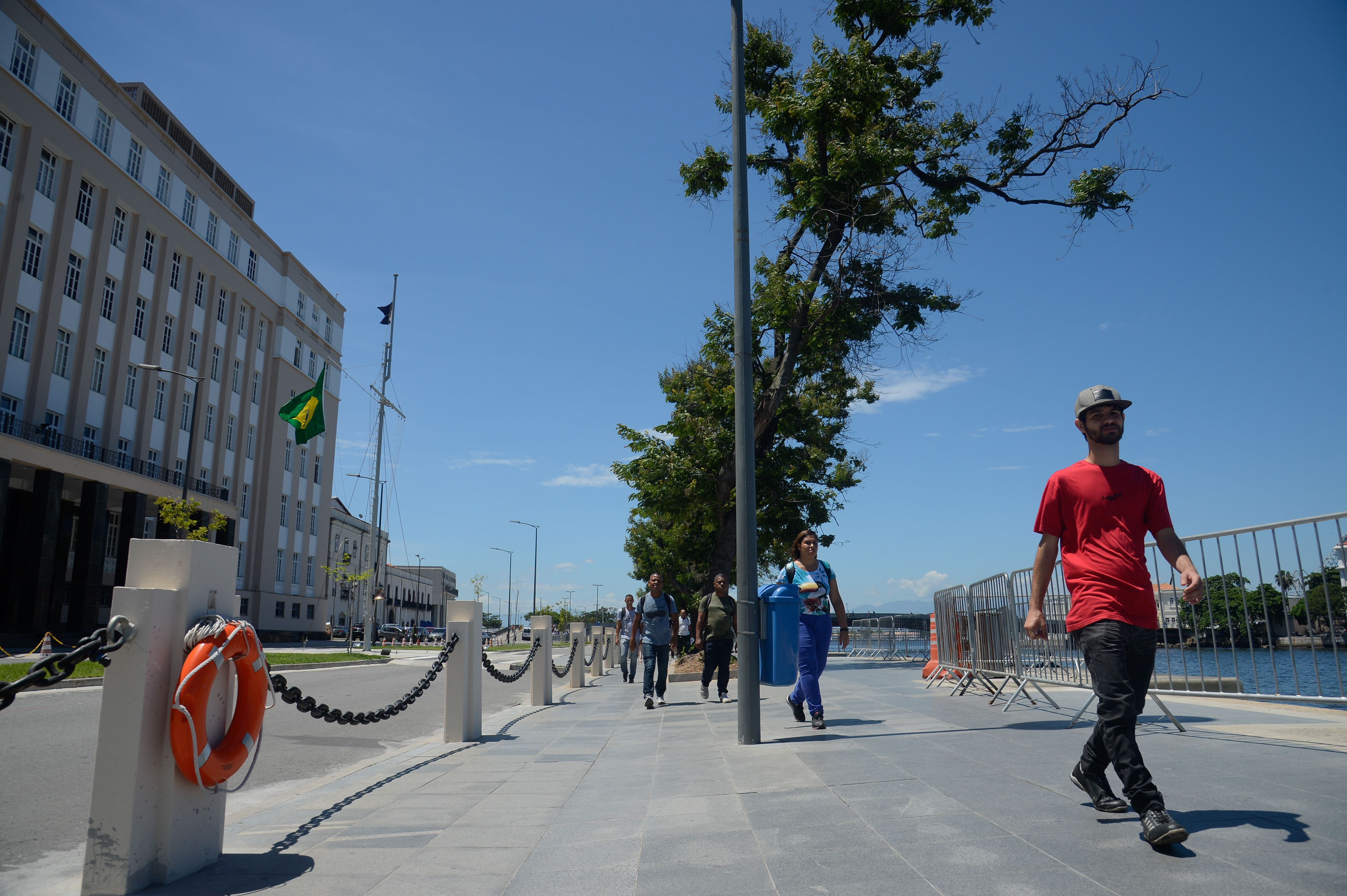 Rio de Janeiro - Marinha retira parcialmente grades de trecho da Orla Conde, no Boulevard Olímpico, zona portuária do Rio.